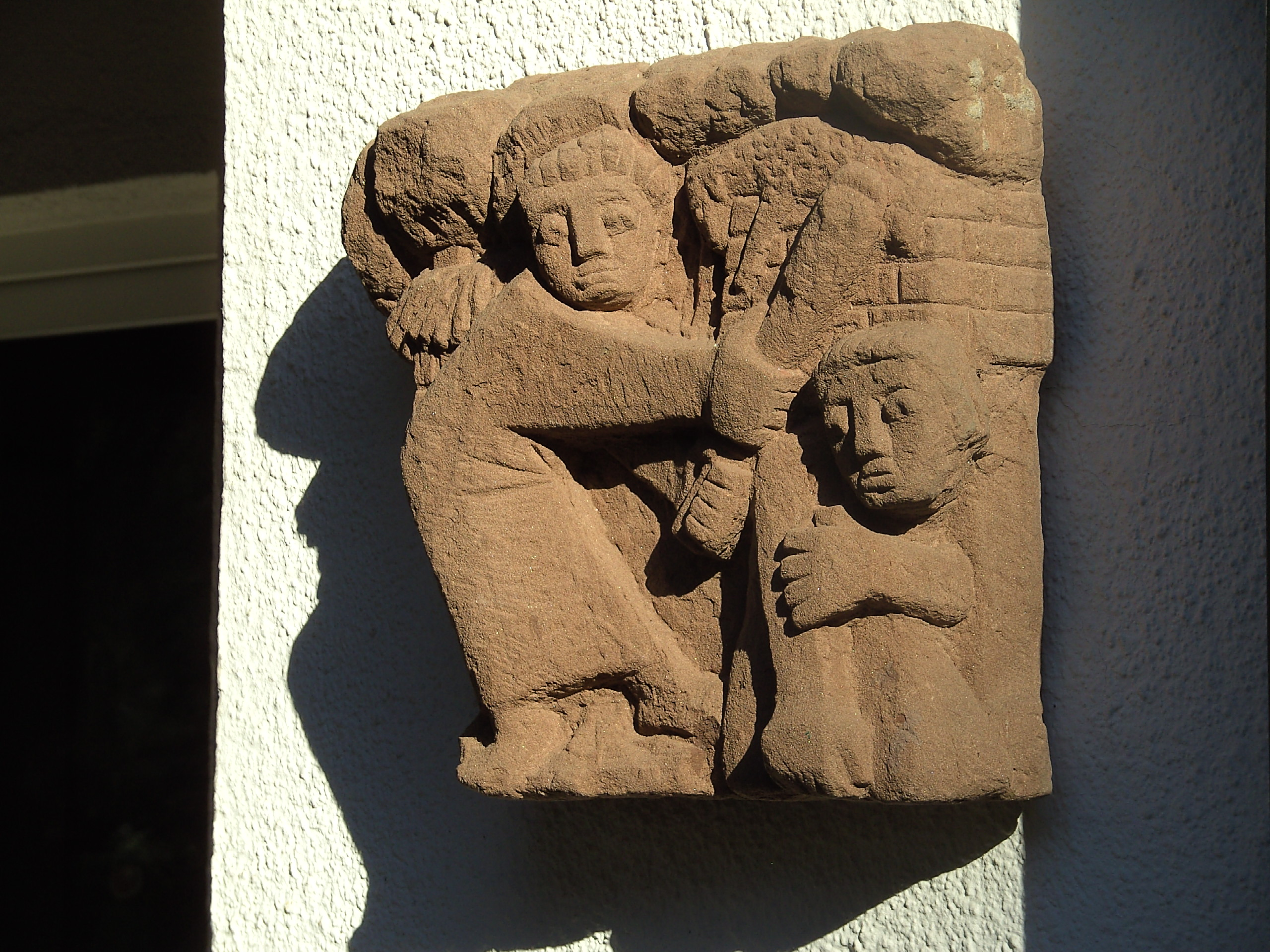 „Kain und Abel“, biblisches Motiv vom Brudermord, Sandsteinrelief von Johannes Reinarz, 1961